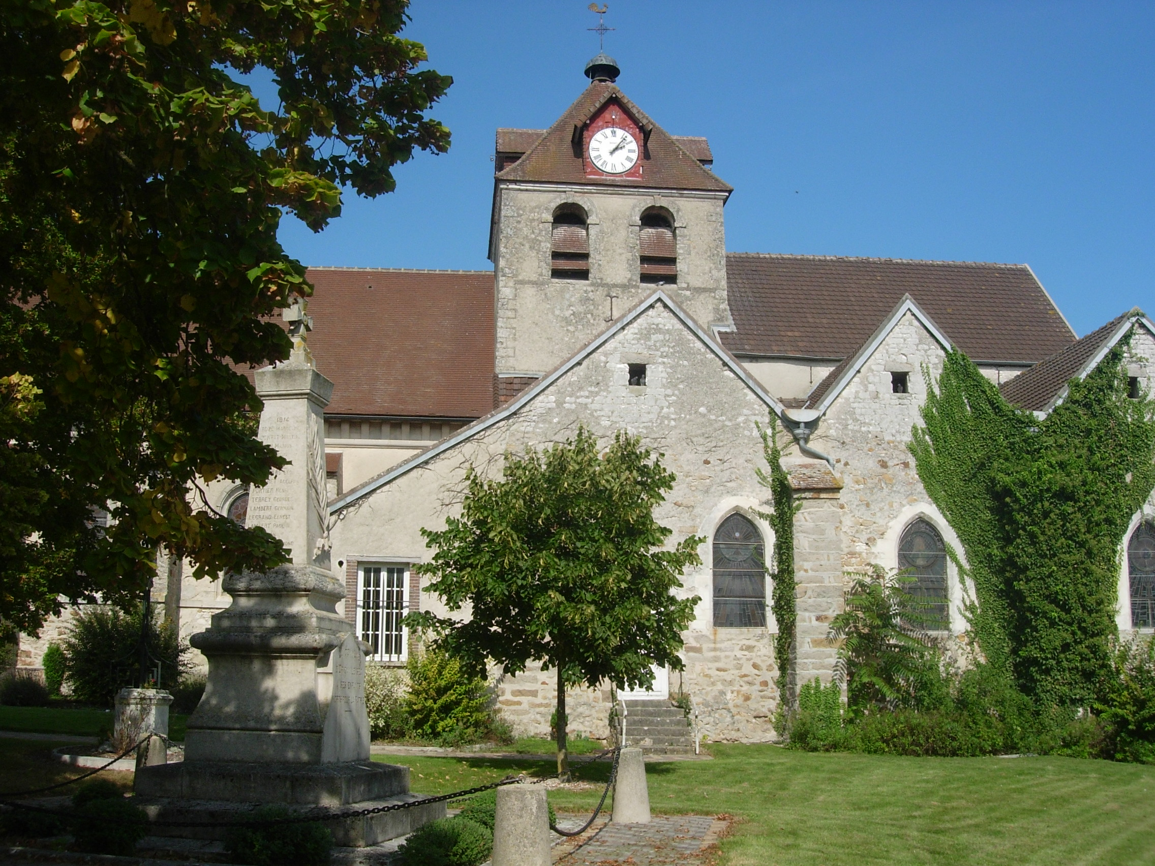 Origny-le-Sec